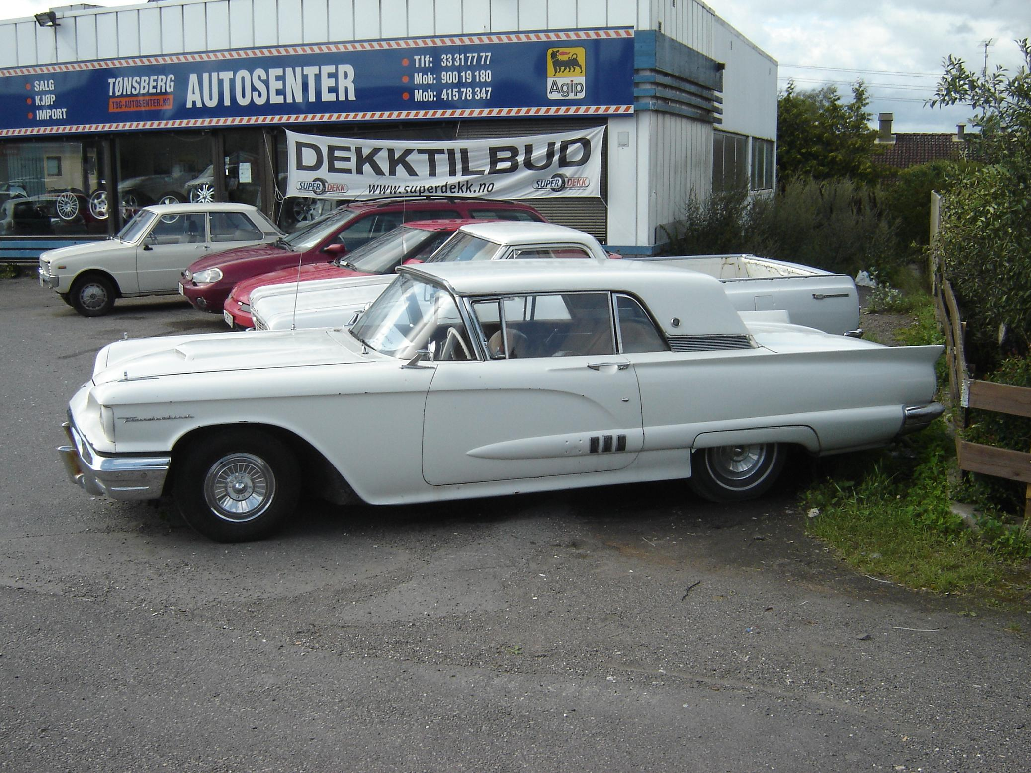 Ford Thunderbird 1958